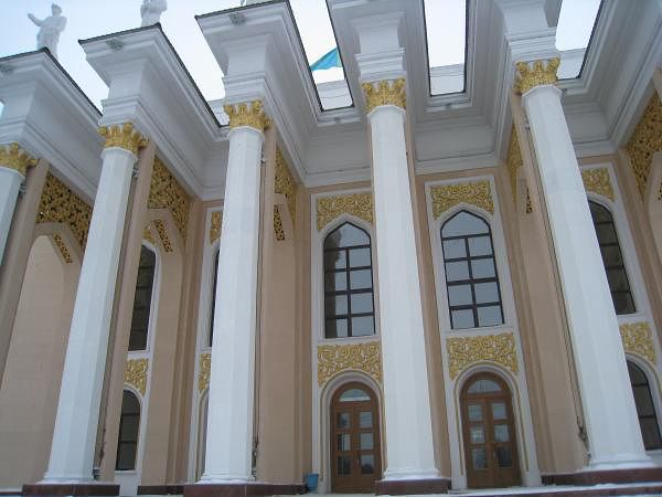 Дворец Культуры Горняков г.Караганда - 1 из памятников культуры города